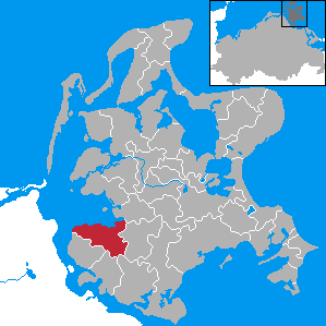 Rambin, Landkreis Rügen, Mecklenburg-Vorpommern